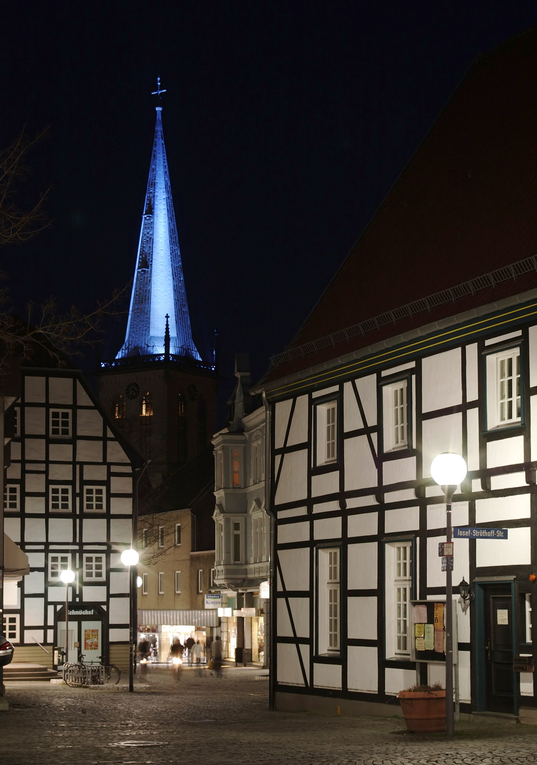 Stadtkirche Unna, Nordrhein-Westfalen. Nachts wird die kupferne, grünspangefärbte Turmhaube mit blauen Scheinwerfern angestrahlt. Blick von der Hertinger Straße in Richtung Alter Markt, im Vordergrund rechts das denkmalgeschützte "Fäßchen".